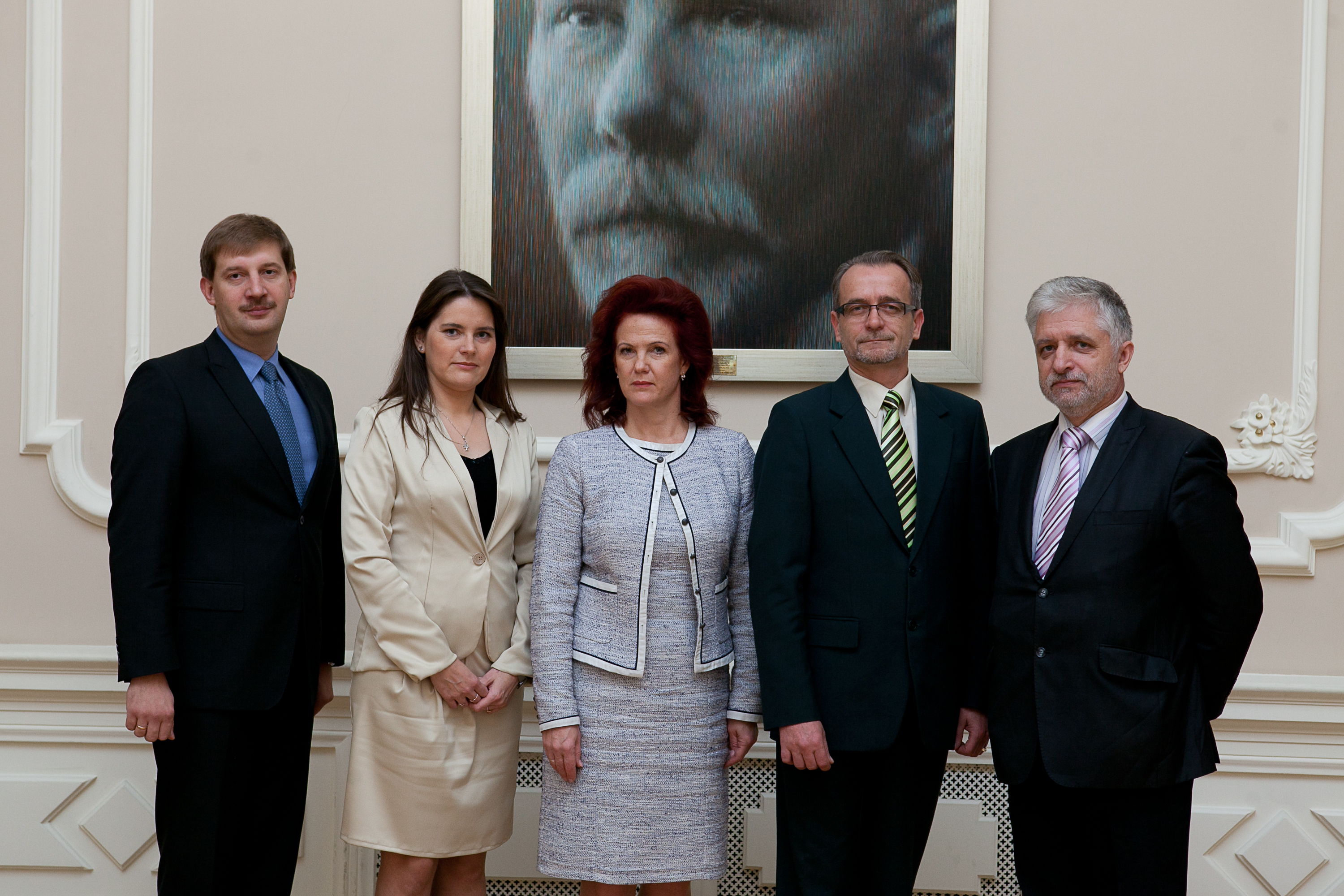 2011.gada 19.oktobris. Saeimas Prezidija sēde. No kreisās: Saeimas priekšsēdētājas biedrs Andrejs Klementjevs, Saeimas priekšsēdētājas biedre Inga Bite, Saeimas priekšsēdētāja Solvita Āboltiņa, Saeimas sekretārs Dzintars Rasnačs un Saeimas sekretāra biedrs Jānis Vucāns. Foto: Ernests Dinka, Saeimas kanceleja